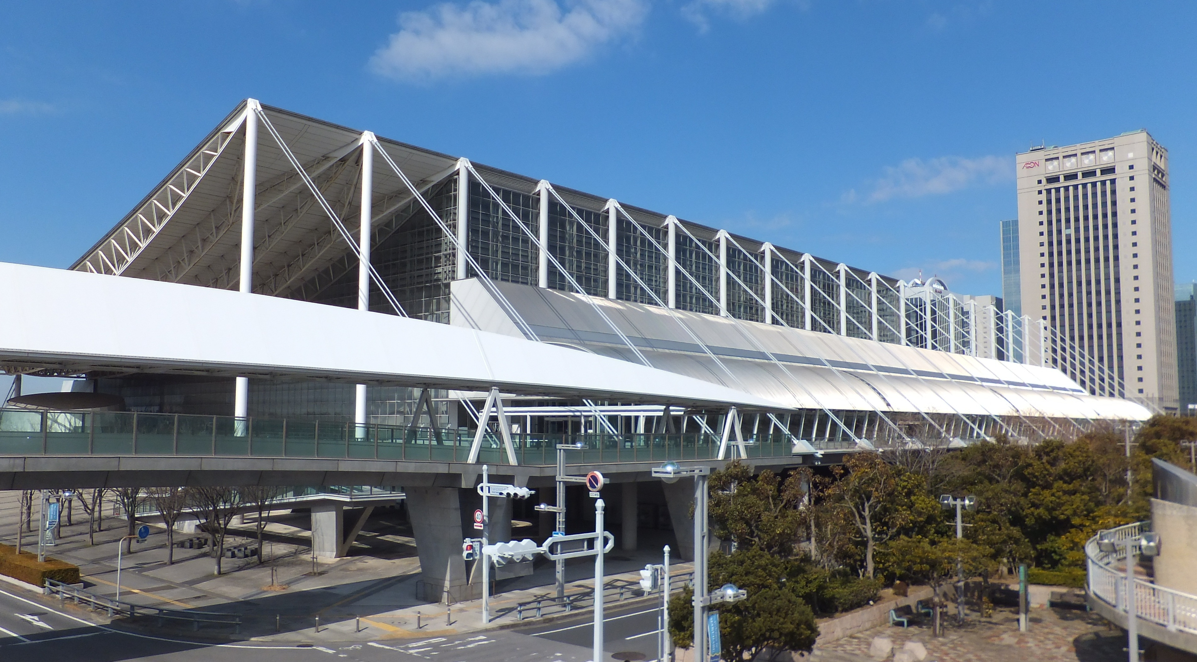 幕張メッセ国際展示場棟9～11ホール